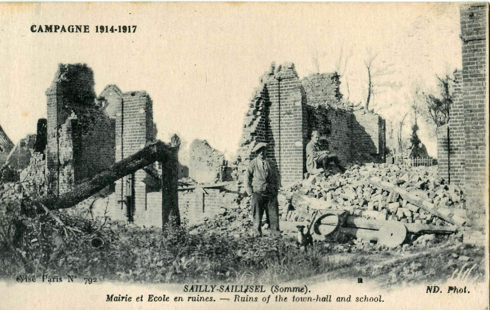 Carte postale ancienne éditée par ND, collection Campagne 1914-1917 :SAILLY-SAILLISEL - Mairie et école en ruines